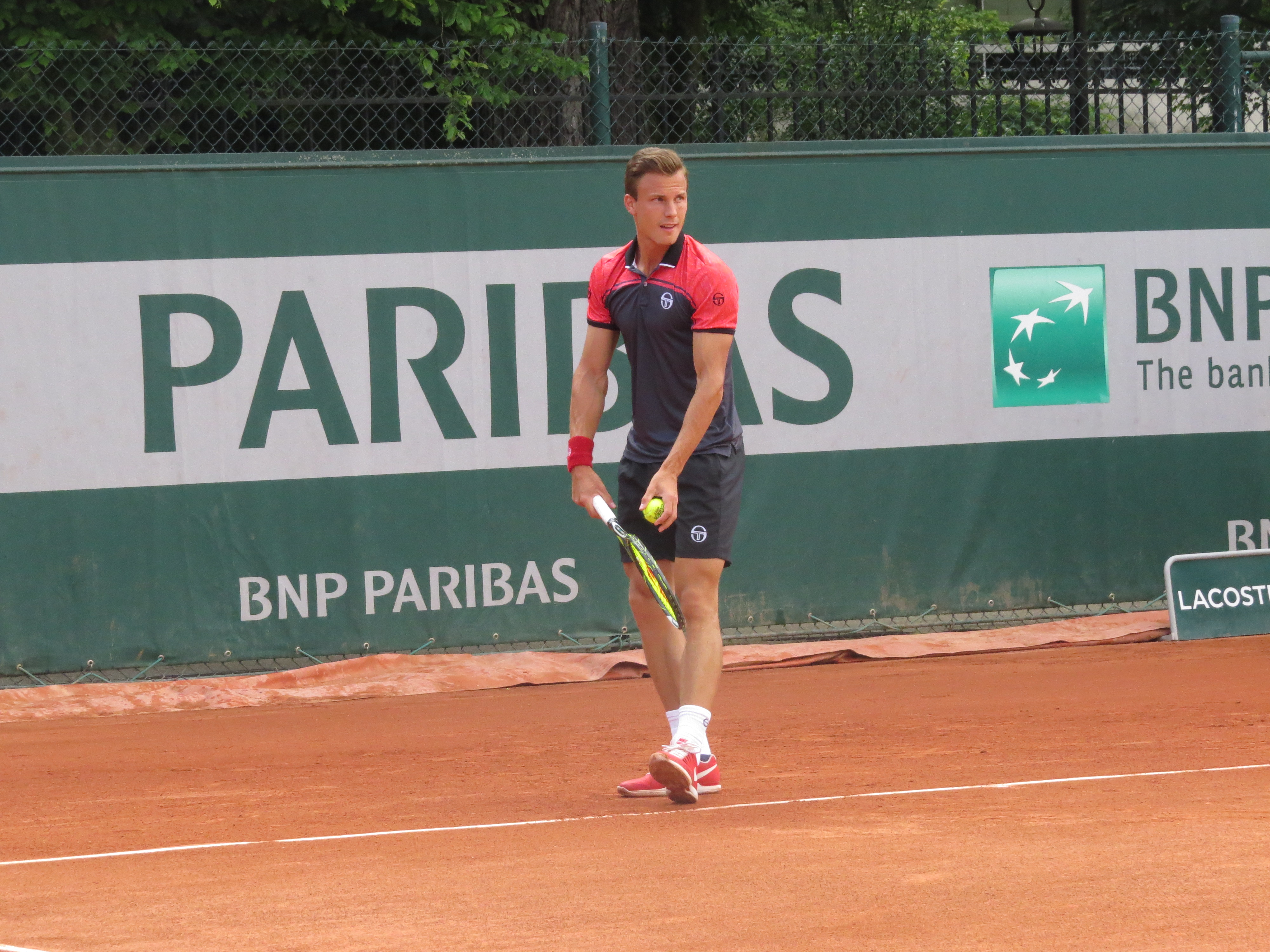 Márton Fucsovics lors de son deuxième tour des qualifications face à Stefano Napolitano (court n°12)